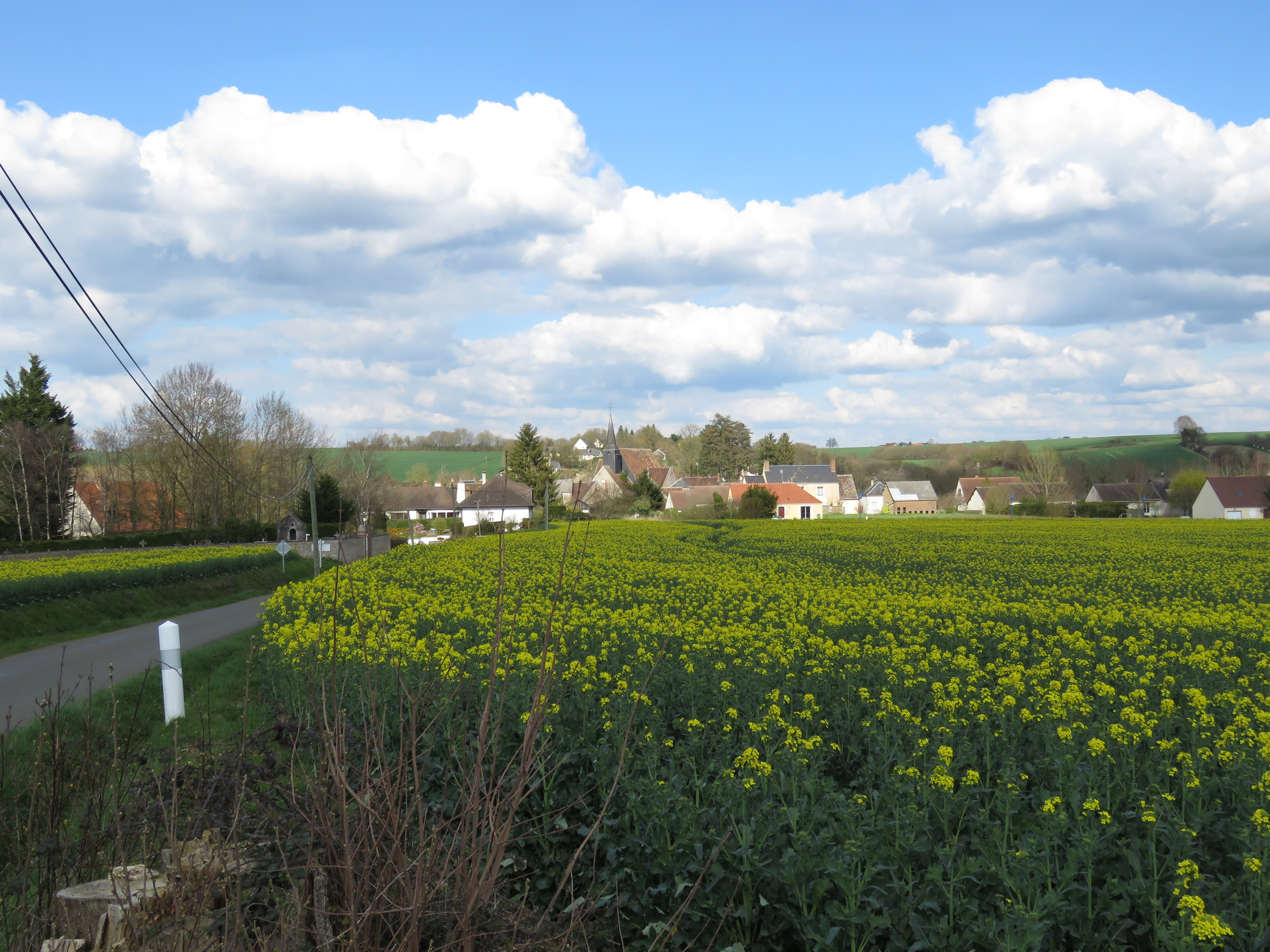 Vue du bourg depuis l'ouest.